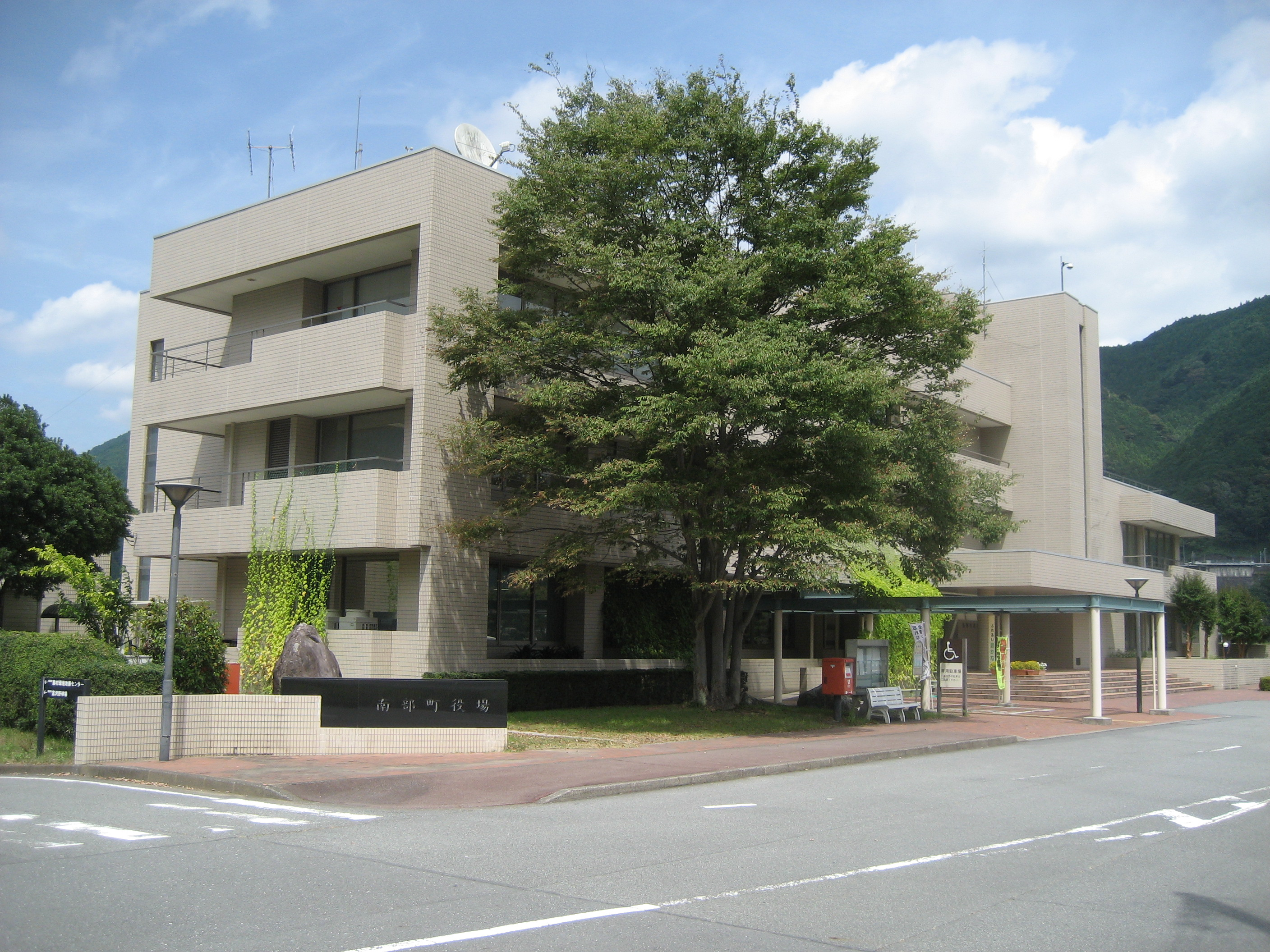 山梨県南部町役場庁舎